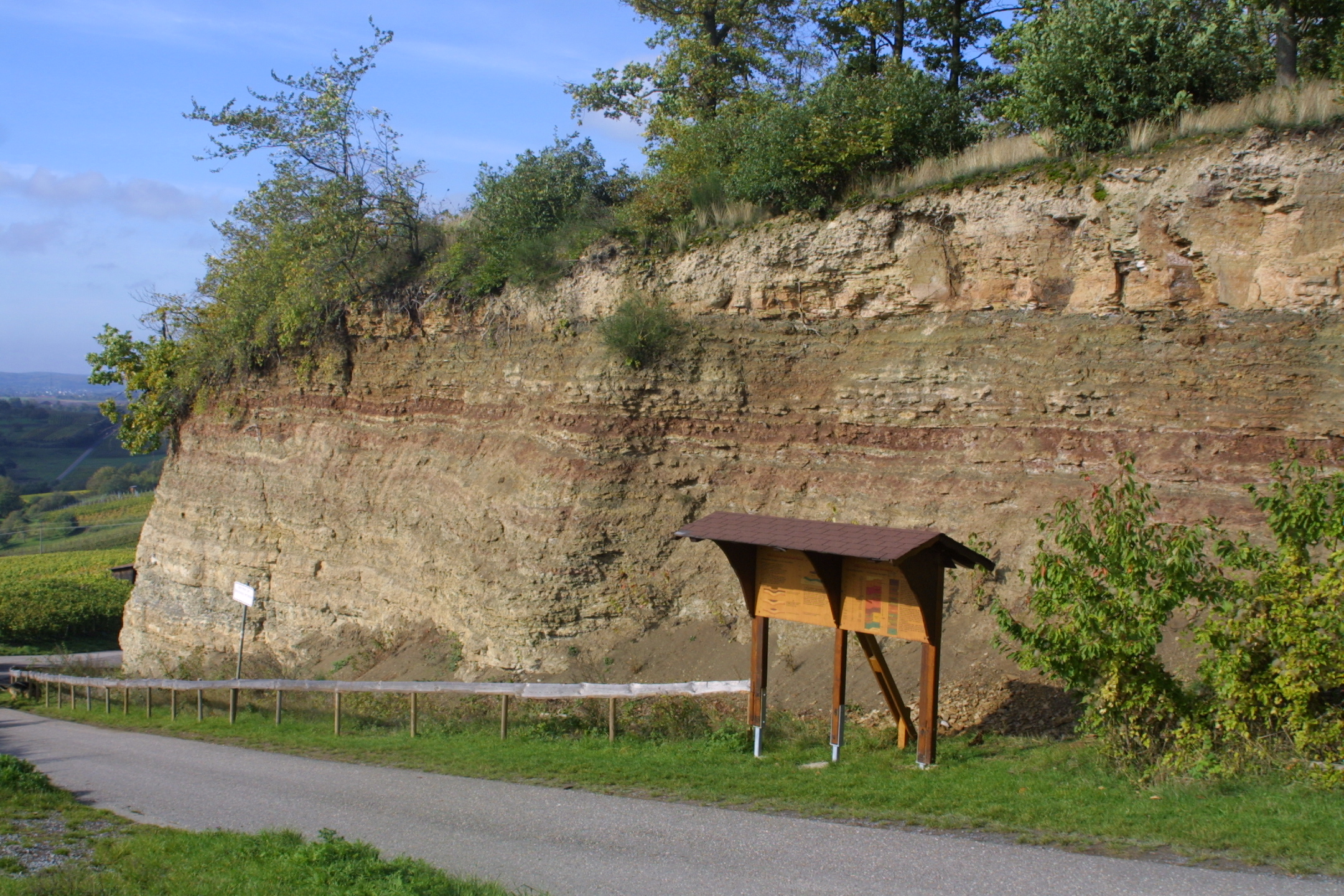 Mächtiger Aufschluss des Gipskeupers mit Übergang zum Schilfsandstein, entstanden vor ca. 200 Mio Jahren.